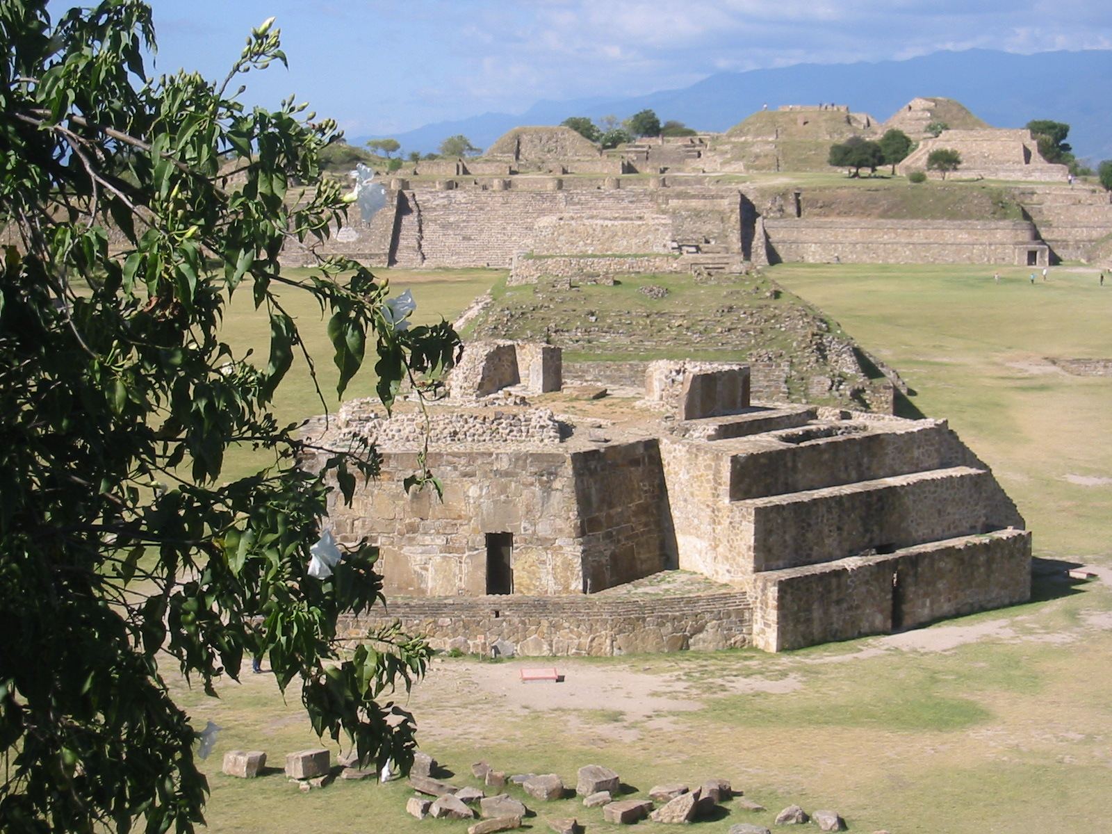 Vista de la Plaza Central desde la Plataforma Sur. Plaza de Monte Albán. Cultura zapoteca.Monte Alban